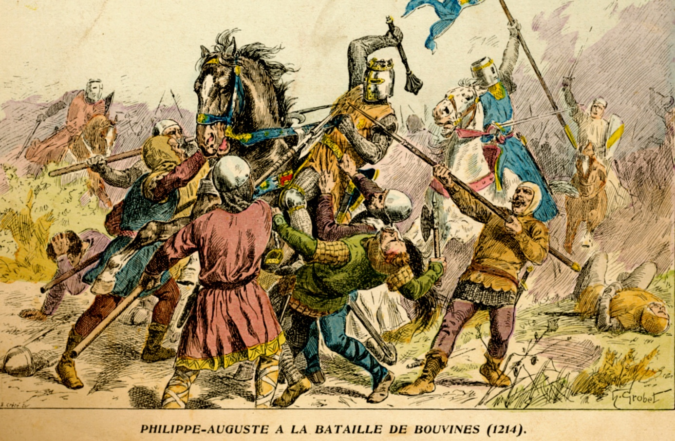 Philippe Auguste à la bataille de Bouvines (1214). Lithographie en couleurs par E. Crété d'après une illustration de H. Grobet, Histoire de France, Paris, Émile Guérin, 1902 [1].